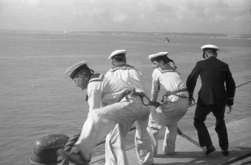 Schulschiff "Gorch Fock" in Lissabon